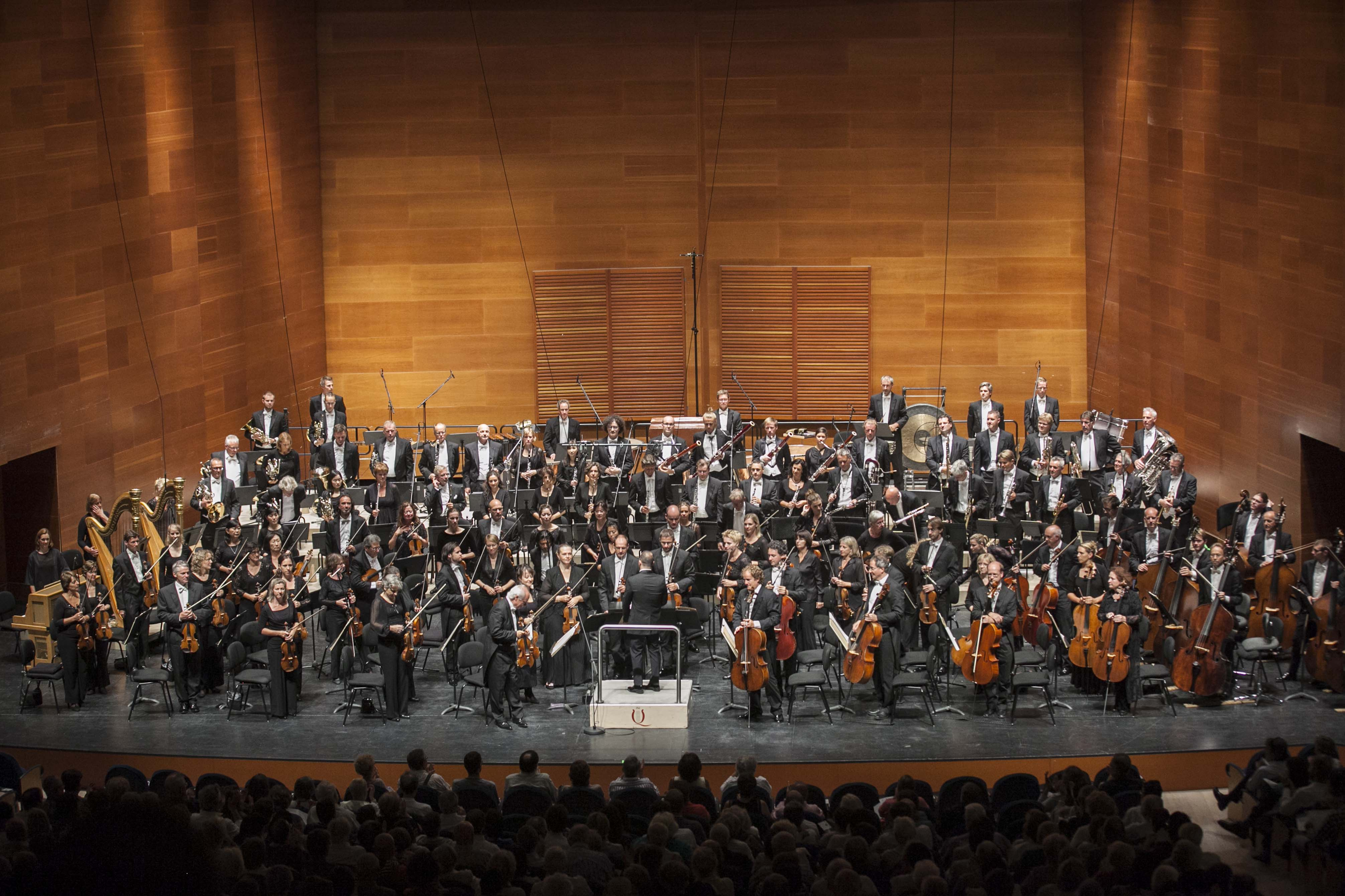 © Quincena Musical- Iñigo Ibáñez